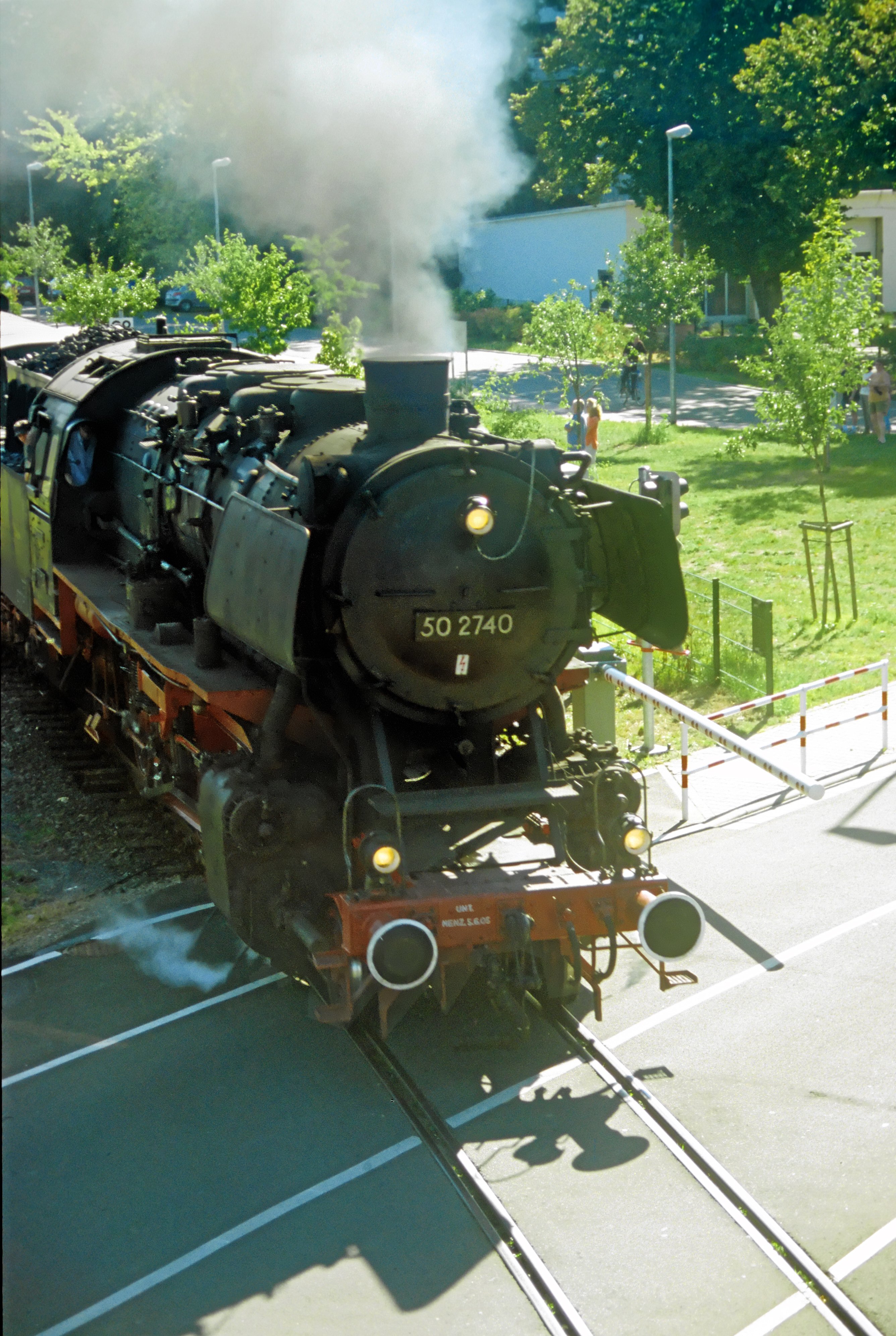 Summersteam Grünstadt 2005, Locomotive 50 2740 drives to Monsheim , Vapeur d' ete Grünstadt 2005, la 50 2740 se dirige vers Monsheim (Camera = Canon EOS 500, Film = Sensia 100)